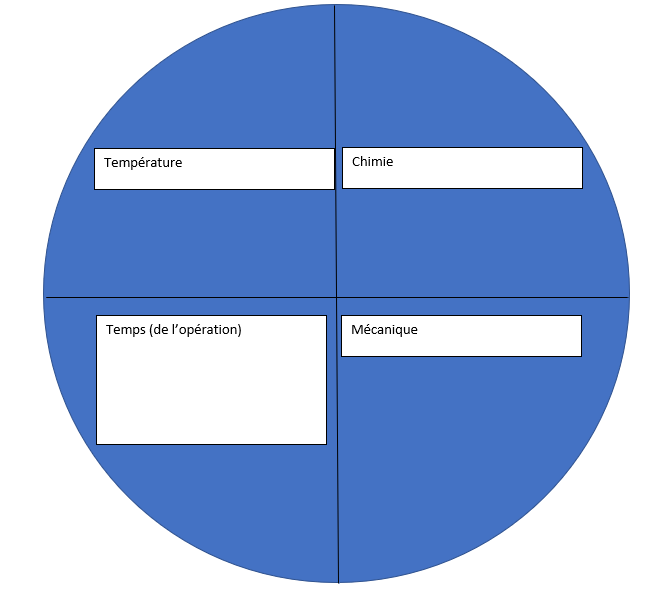 Le résultat final des opérations de nettoyage est lié à 4 facteurs interdépendants qui constitue le cercle de Sinner. Si l'un des facteurs est diminué, il faut alors compenser en augmentant un ou plusieurs des autres facteurs.